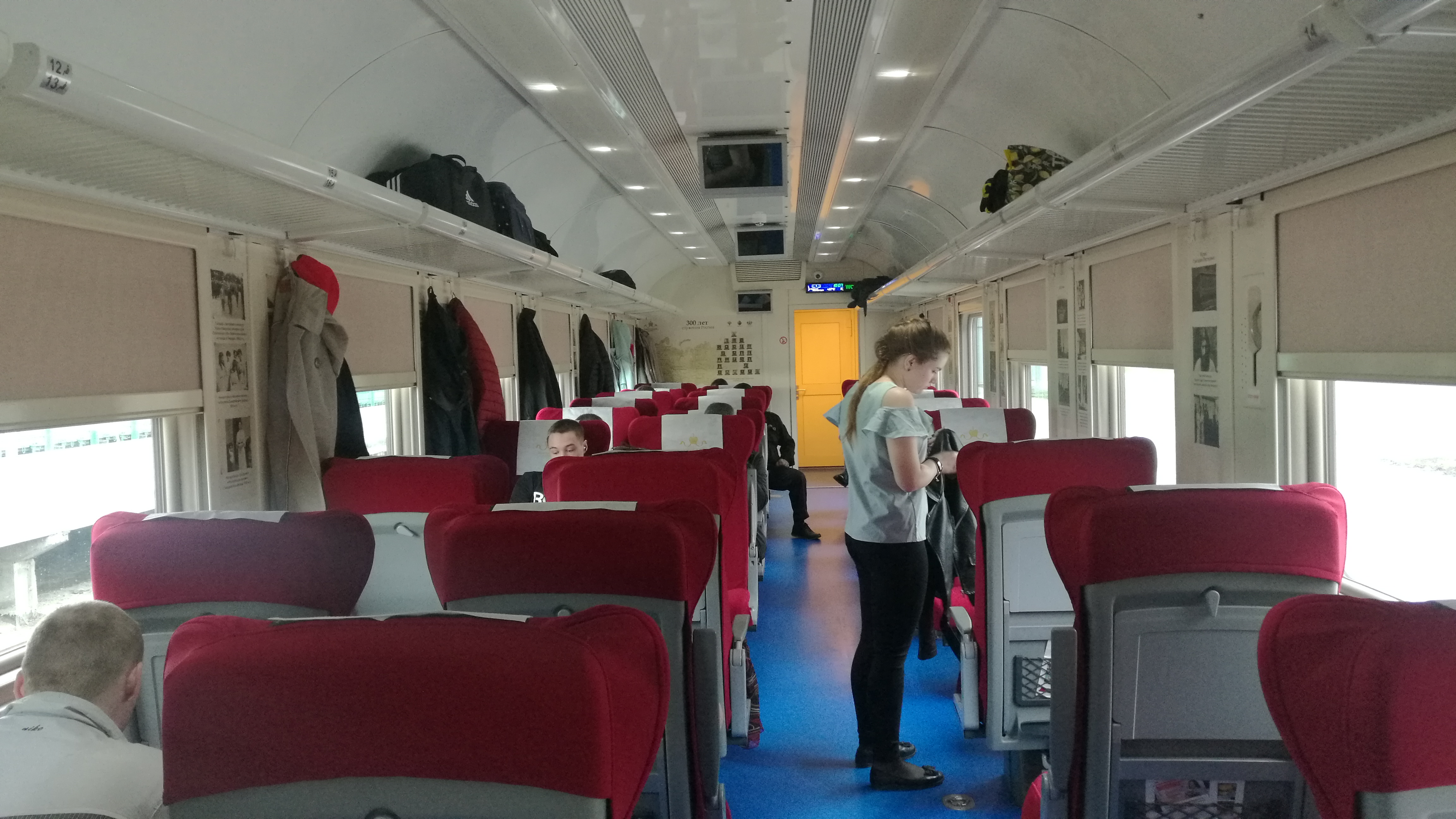 Elektrotrajno Tobolsko - Tjumeno